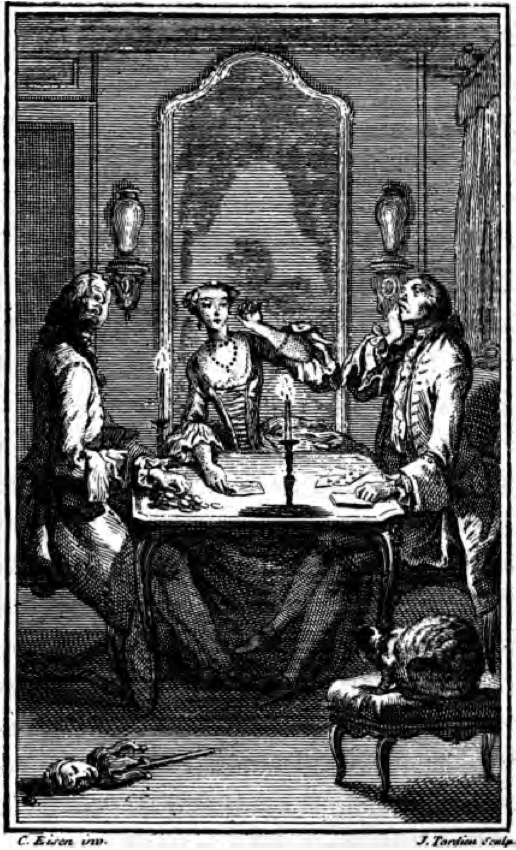 A man being swindled